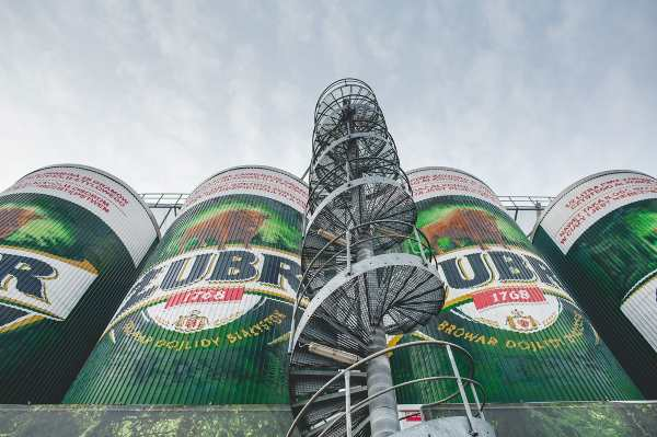 Budynek Browaru Dojlidy